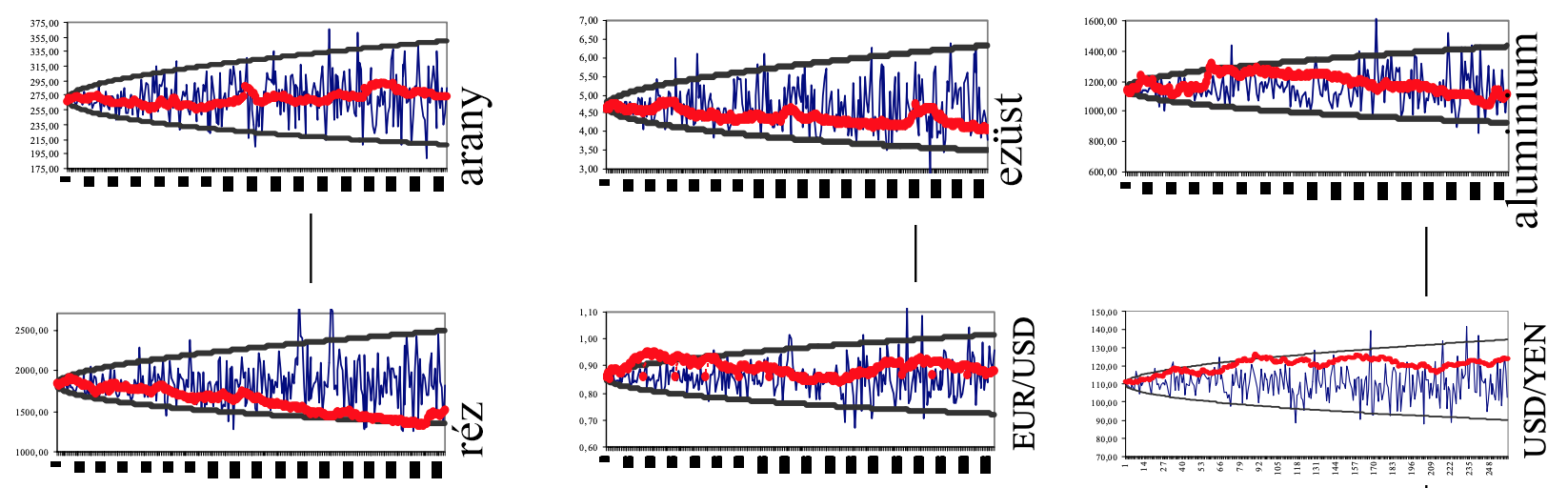 MCMC szimulációk (arany, ezüst, aluminium, réz, EURUSD, EURYEN)